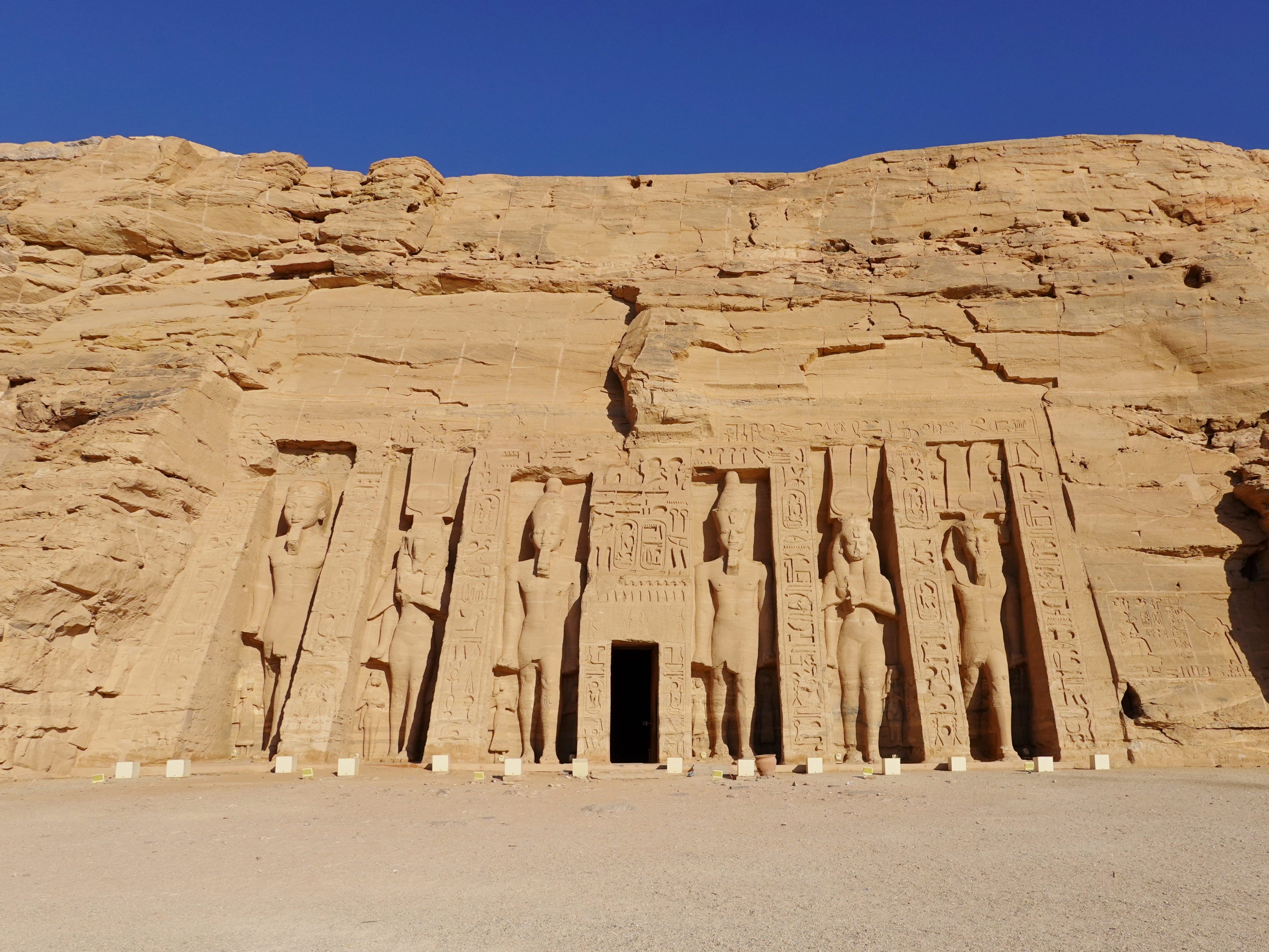 Kleiner Tempel von Abu Simbel (Hathor-Tempel oder Tempel der Nefertari), Ägypten